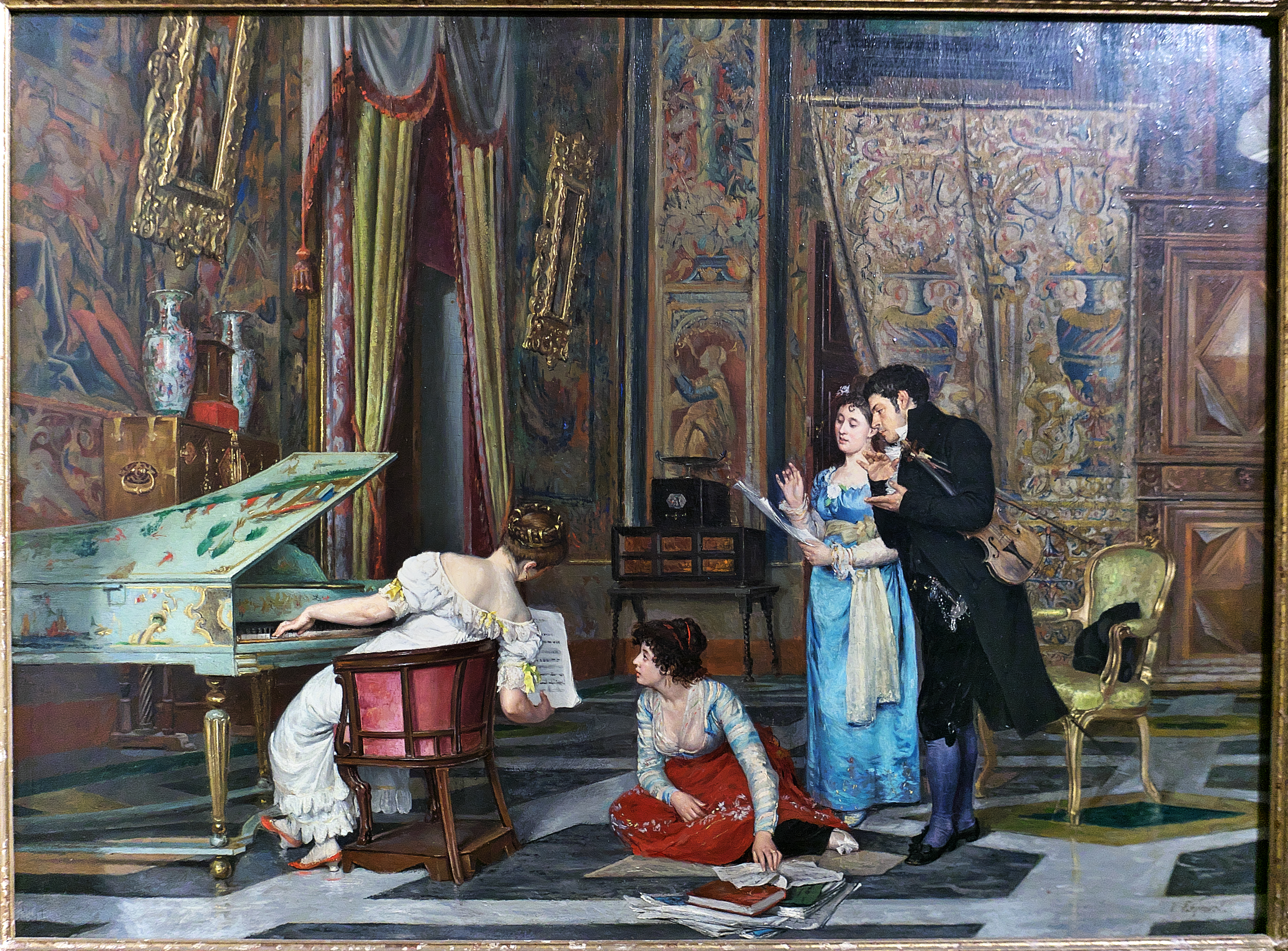 Óleo sobre lienzo, Colección Bellver.